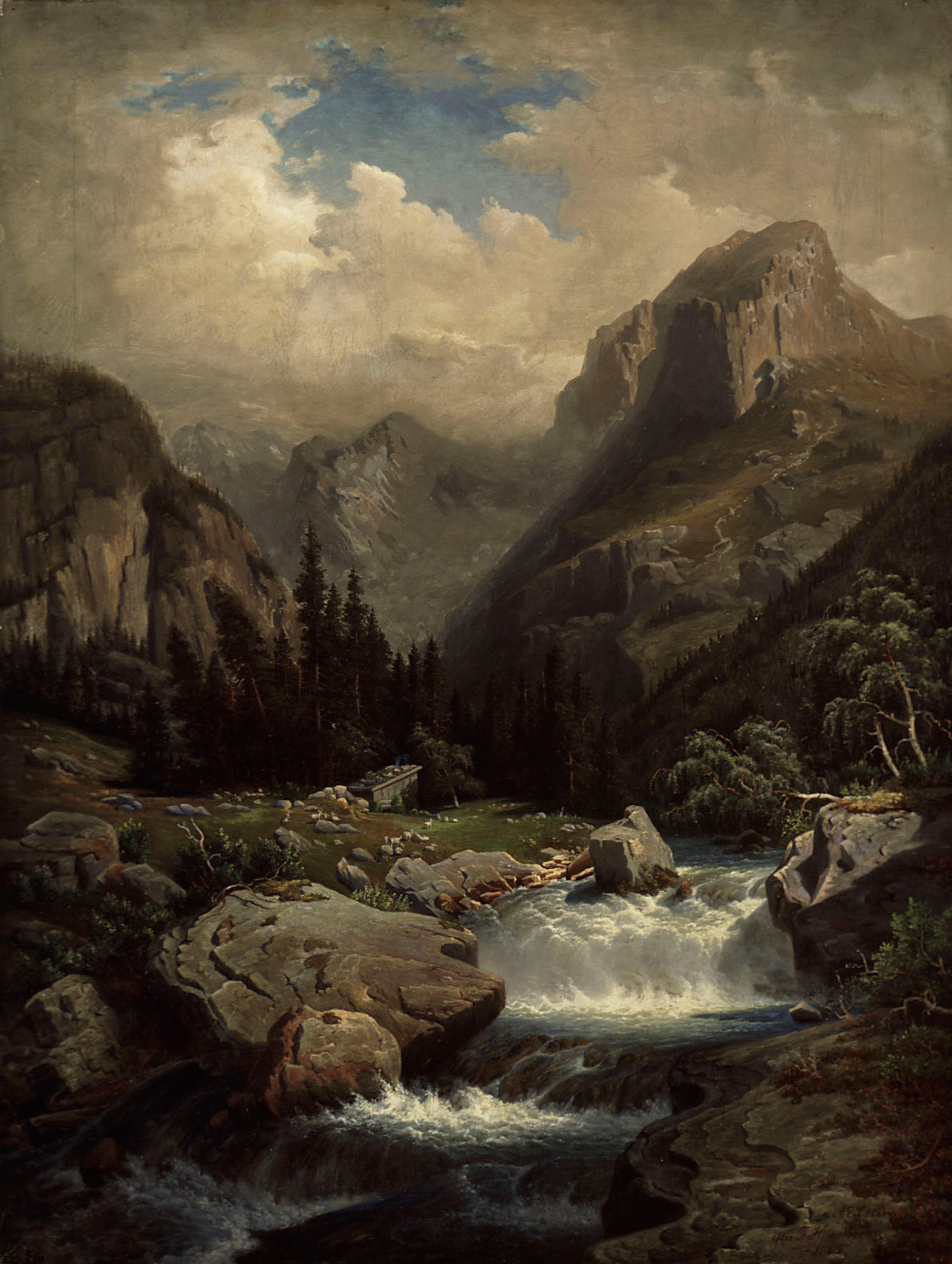 Augusta Soldanin maalaus, kopio saksalaisen Franz Hengsbachin maalauksesta.